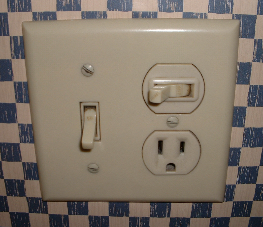 Kombination aus Lichtschalter und Steckdose (moderner USA-Standard)